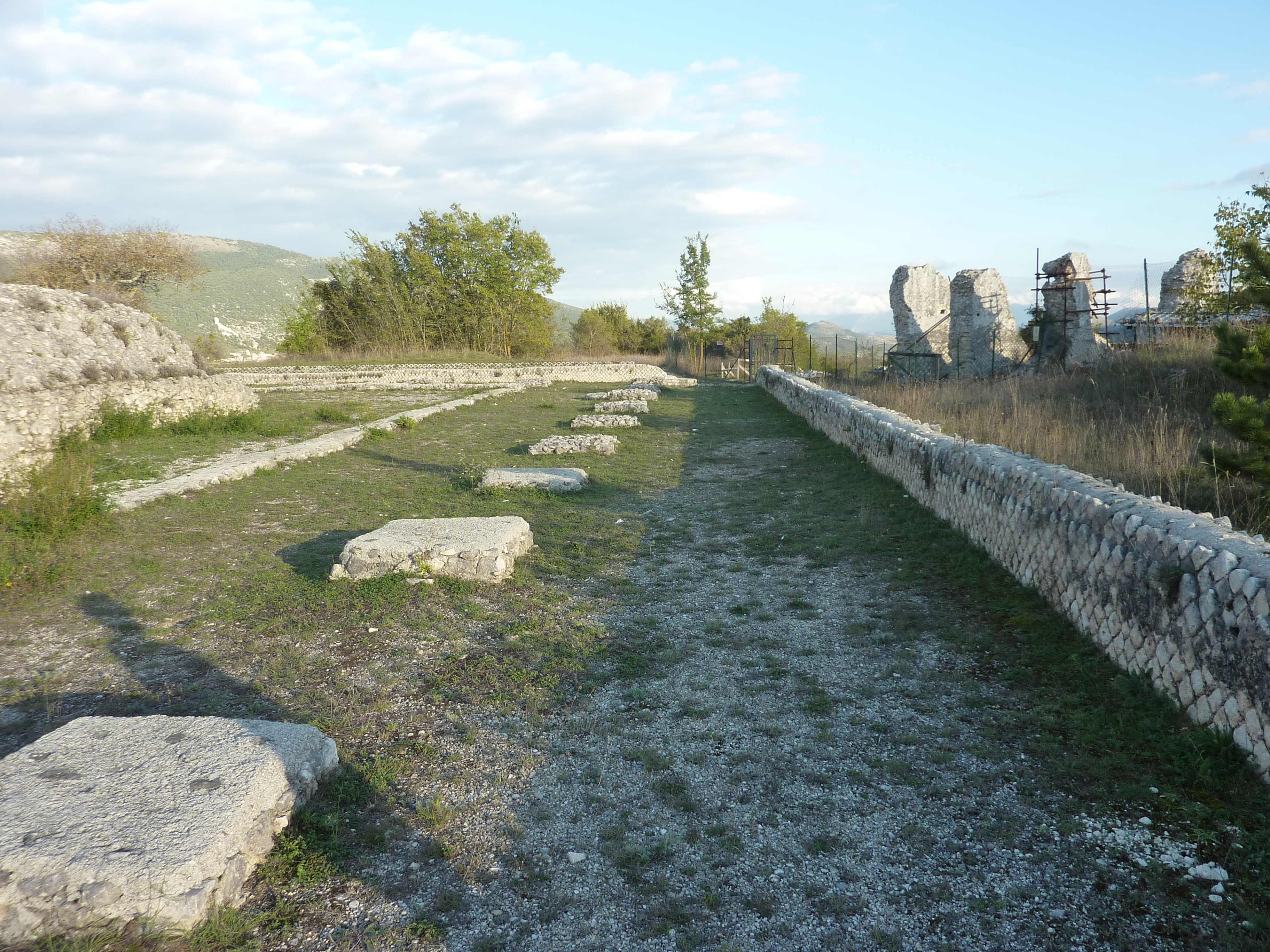 Peltuinum